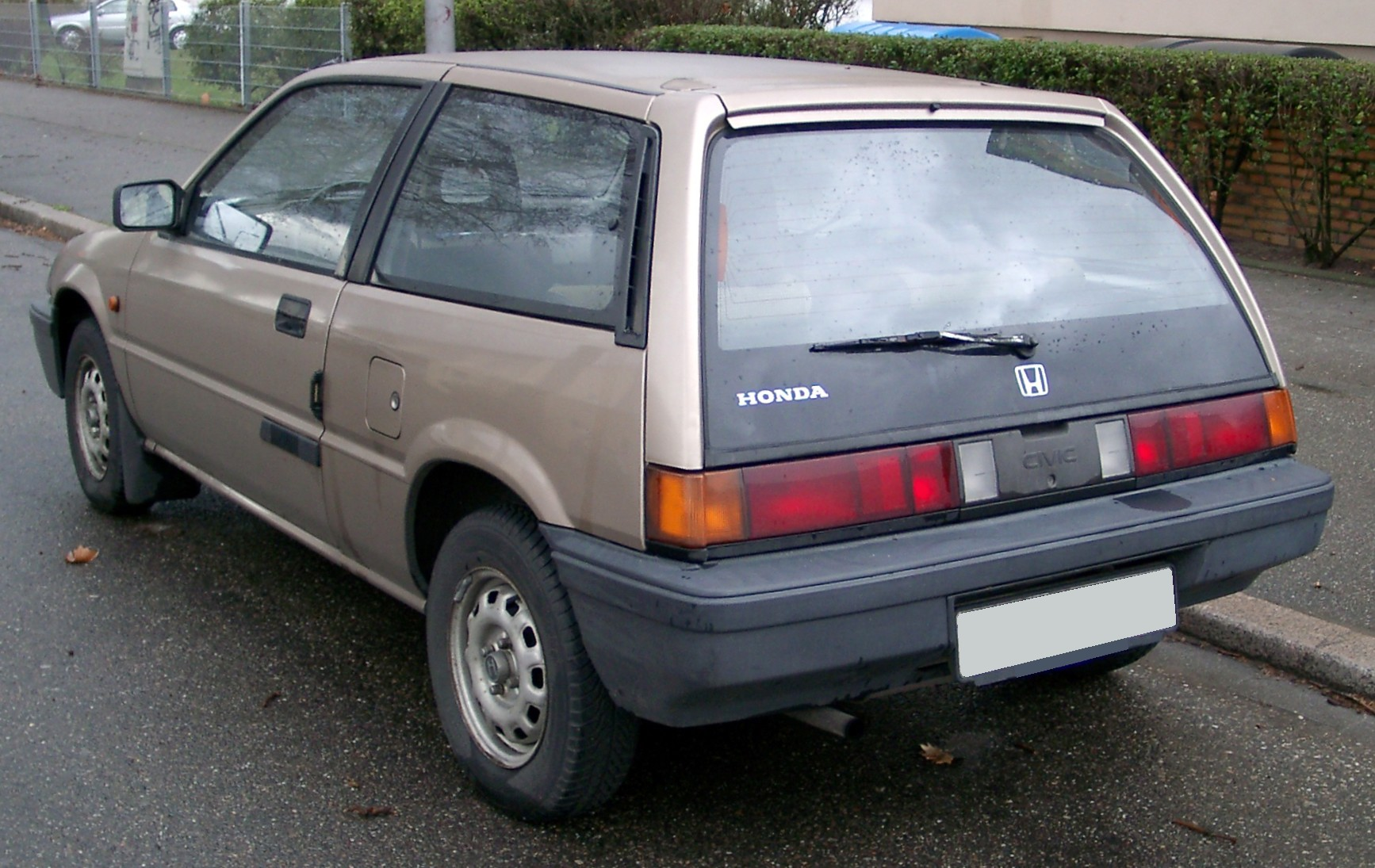 Honda Civic, 3. Generation